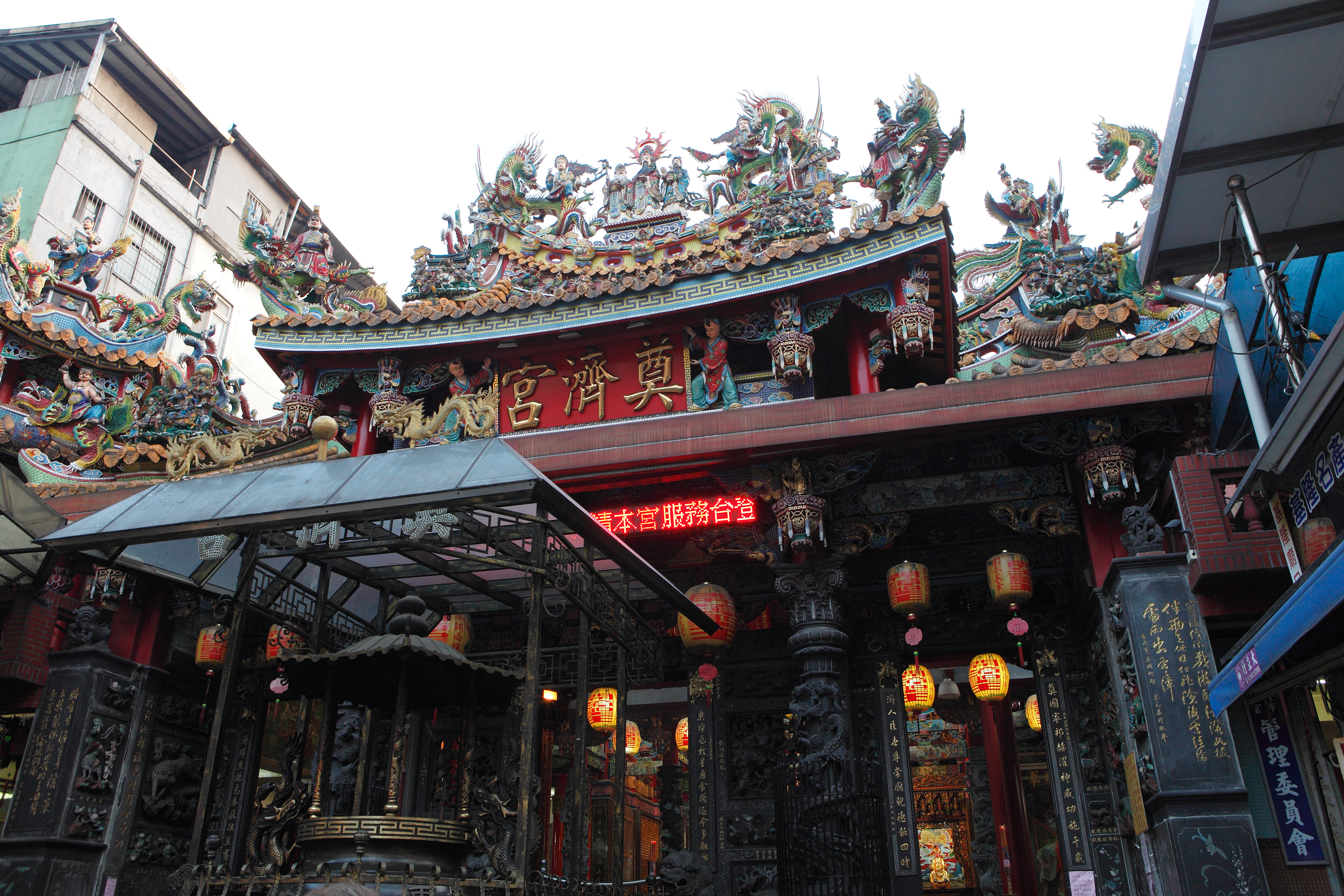 奠濟宮正面。